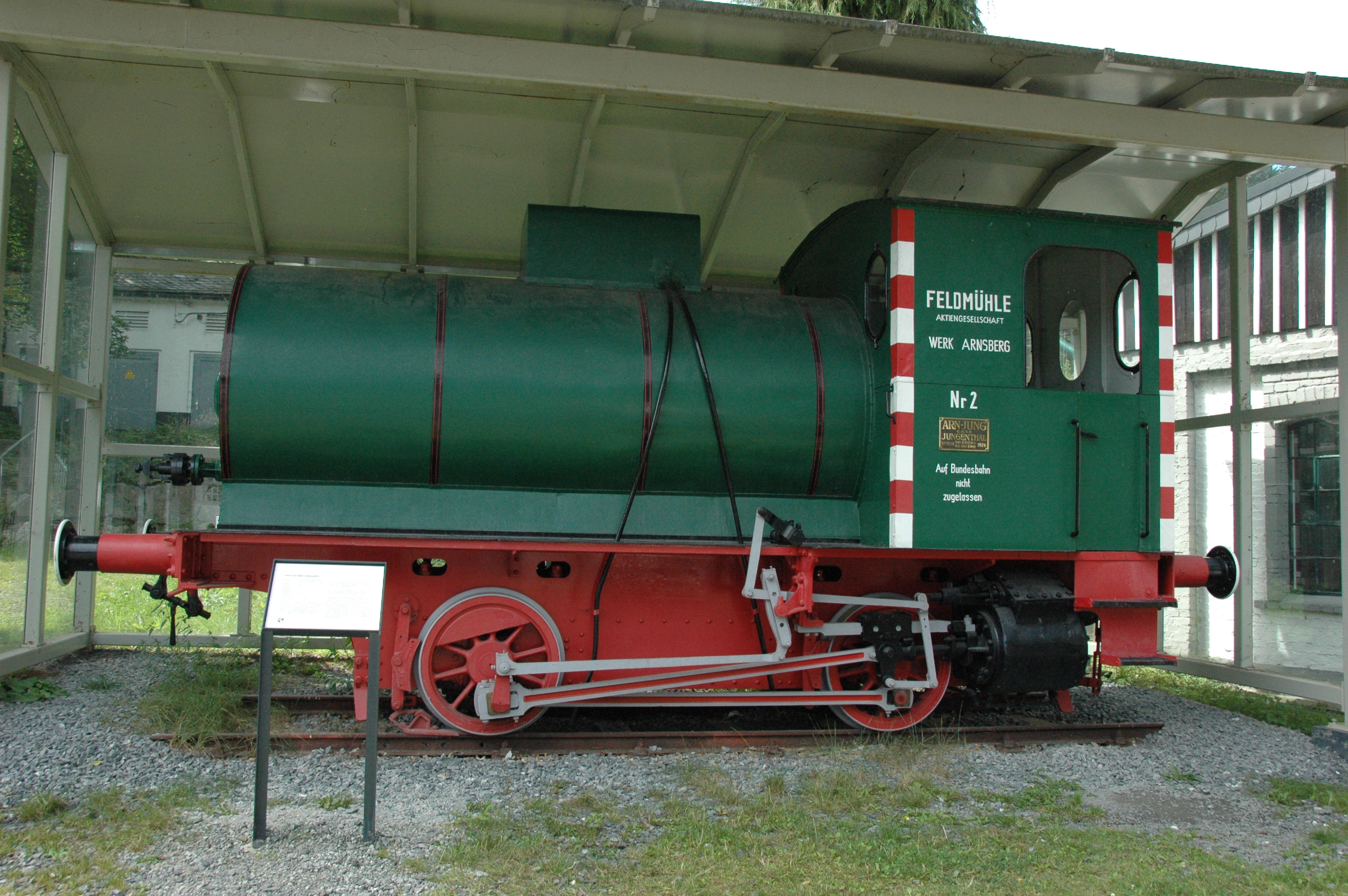 Dampfspeicherlokomotive im Maschinen und Heimatmuseum Eslohe